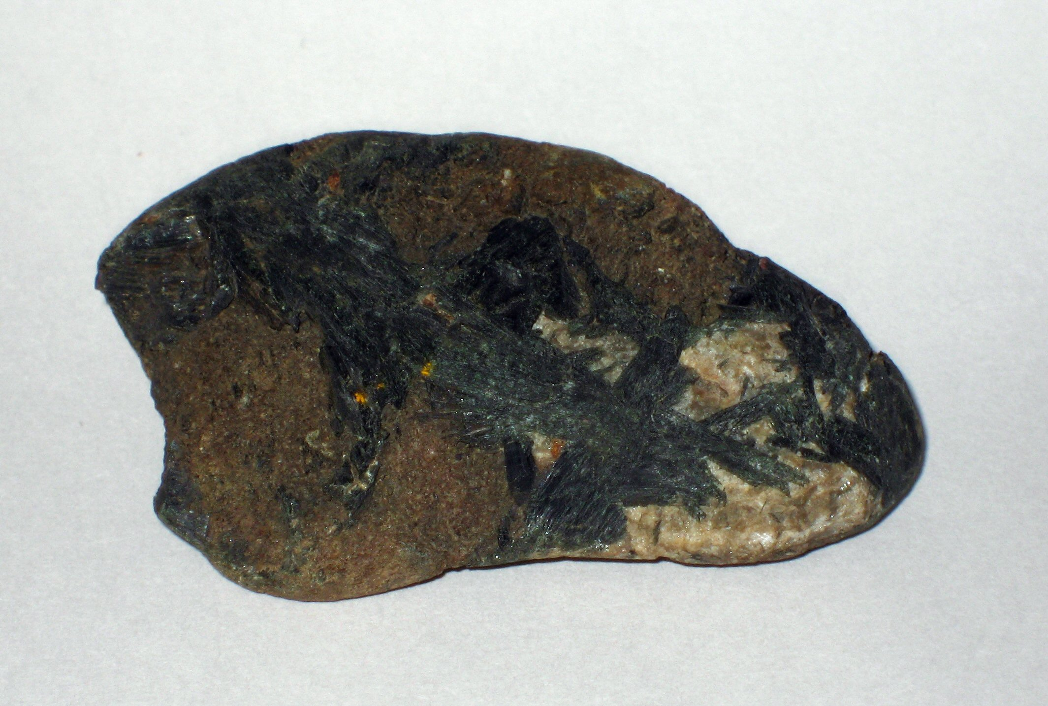 Aktinoliitti / Actinolite